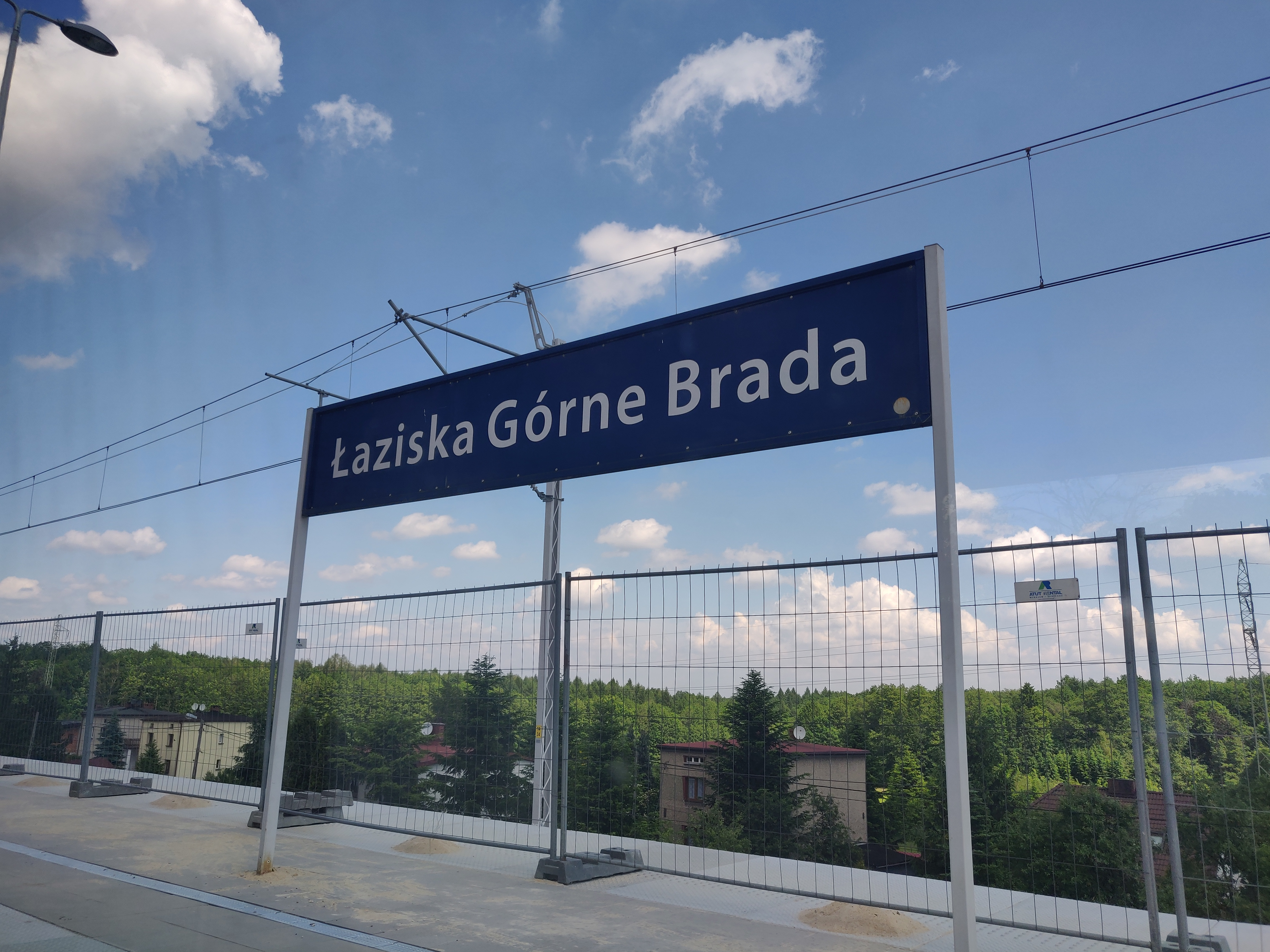 Przystanek kolejowy Łaziska Górne Brada